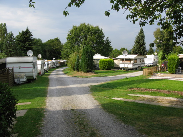 Campingplatz am Stadtwald, Halvestorf